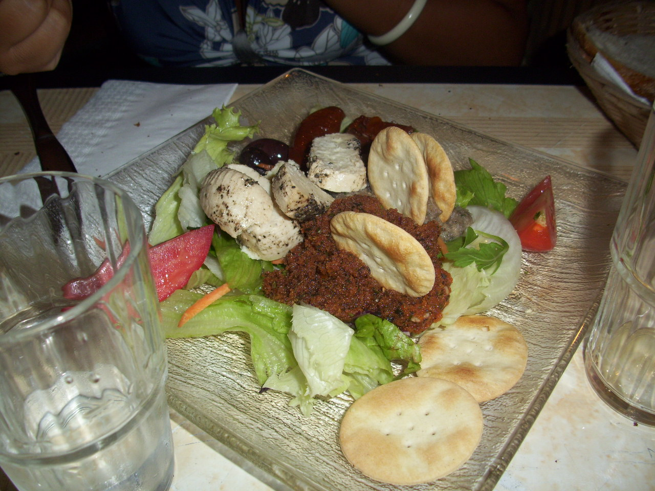 Il maltese platter con formaggio di Ghozo, aioli, bigilla, crostini e insalata